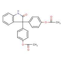 Izafenin